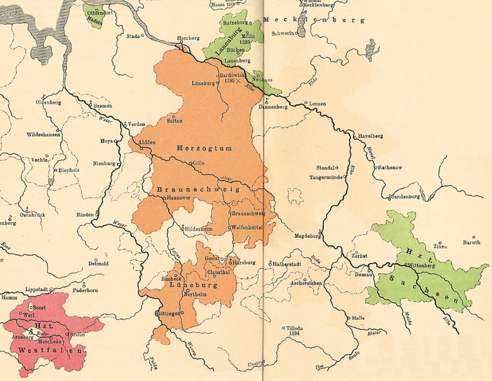 Das sächsischen Herzogtümer um 1235